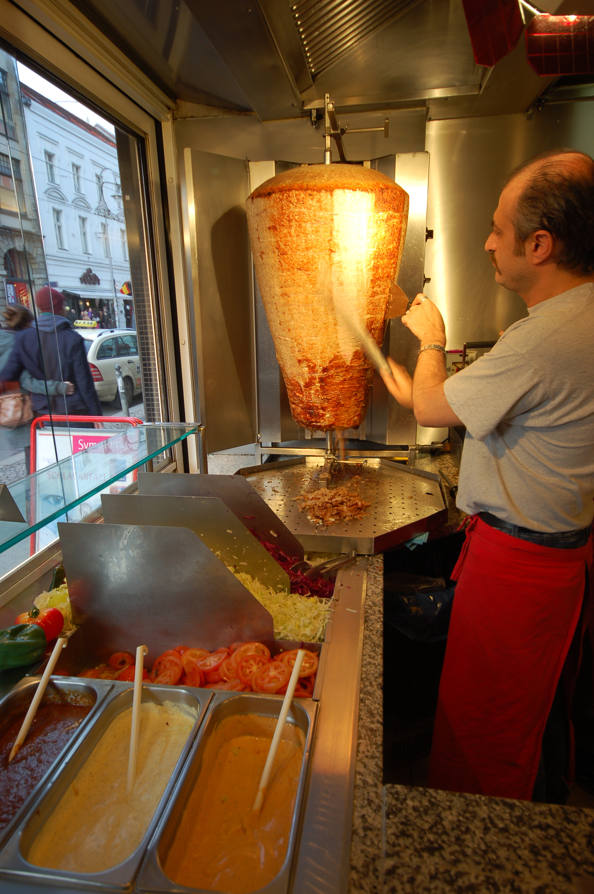 Dönerimbiß am Hackeschen Markt in Berlin